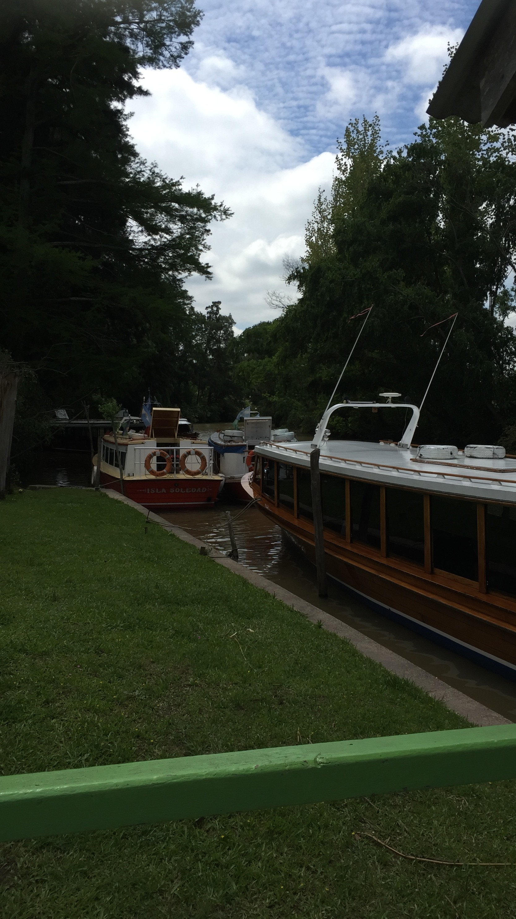 En el Delta del Río Paraná existen aproximadamente 100 Escuelas de Isla a las que los alumnos llegan en lanchas que dependen de la DGCE de la provincia de Buenos Aires.